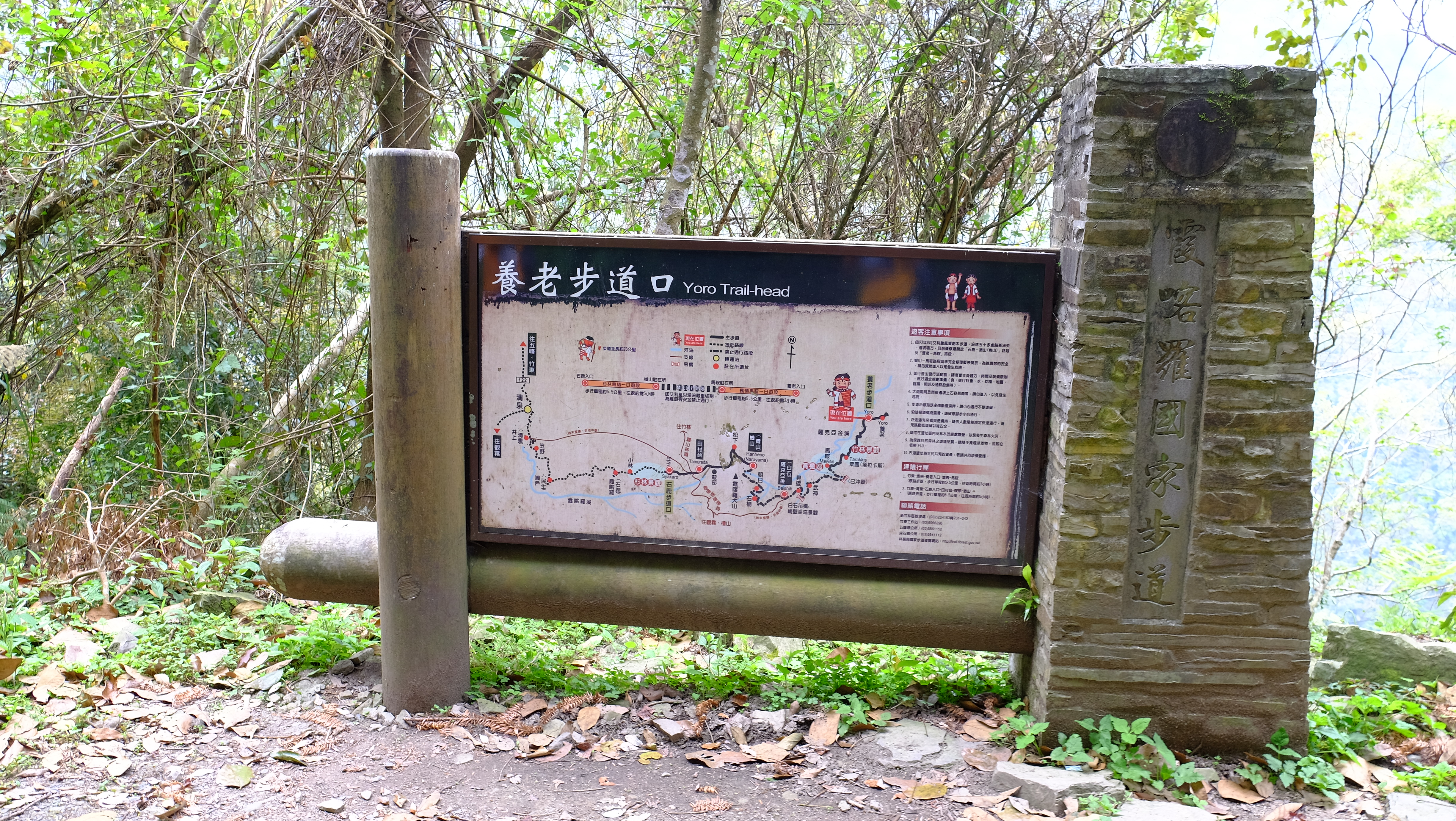 Xiakelo Historic Trail Yoro Trailhead 2018 霞喀羅古道養老步道口